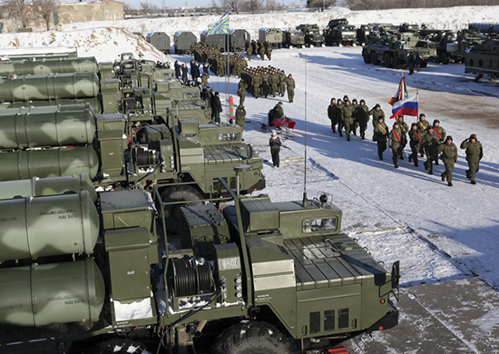 Зенитные ракетные системы С-400 «Триумф» заступили на боевое дежурство в соединении противовоздушной обороны Центрального военного округа (ЦВО) в Поволжье. В торжественной церемонии в Саратовской области принял участие командующий войсками объединения ВВС и ПВО генерал-лейтенант Александр Татаренко.